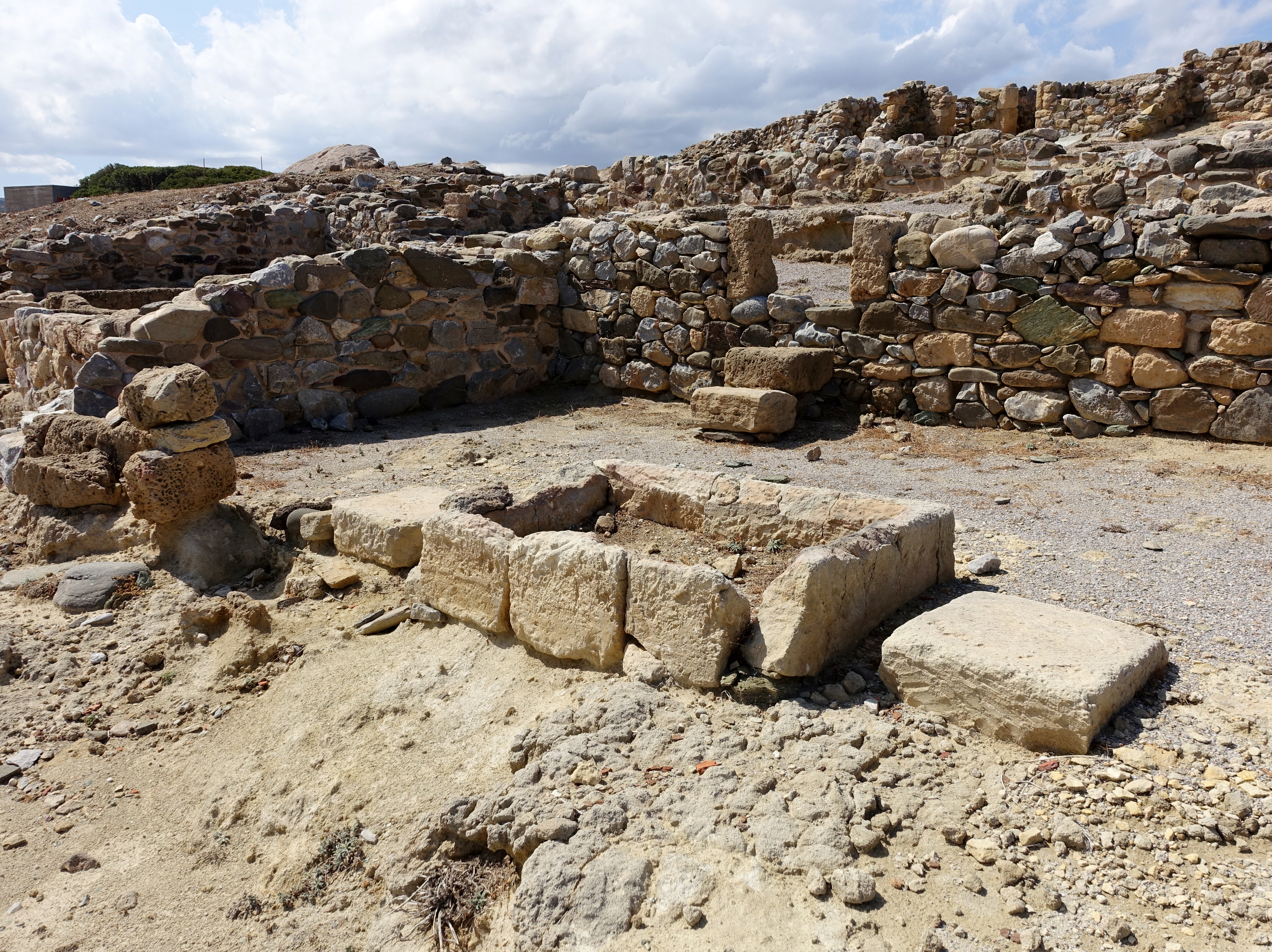 Archäologische Ausgrabungsstätte der hellenistischen Stadt Trypitos (Τρυπητός), Gemeinde Sitia, Kreta, Griechenland